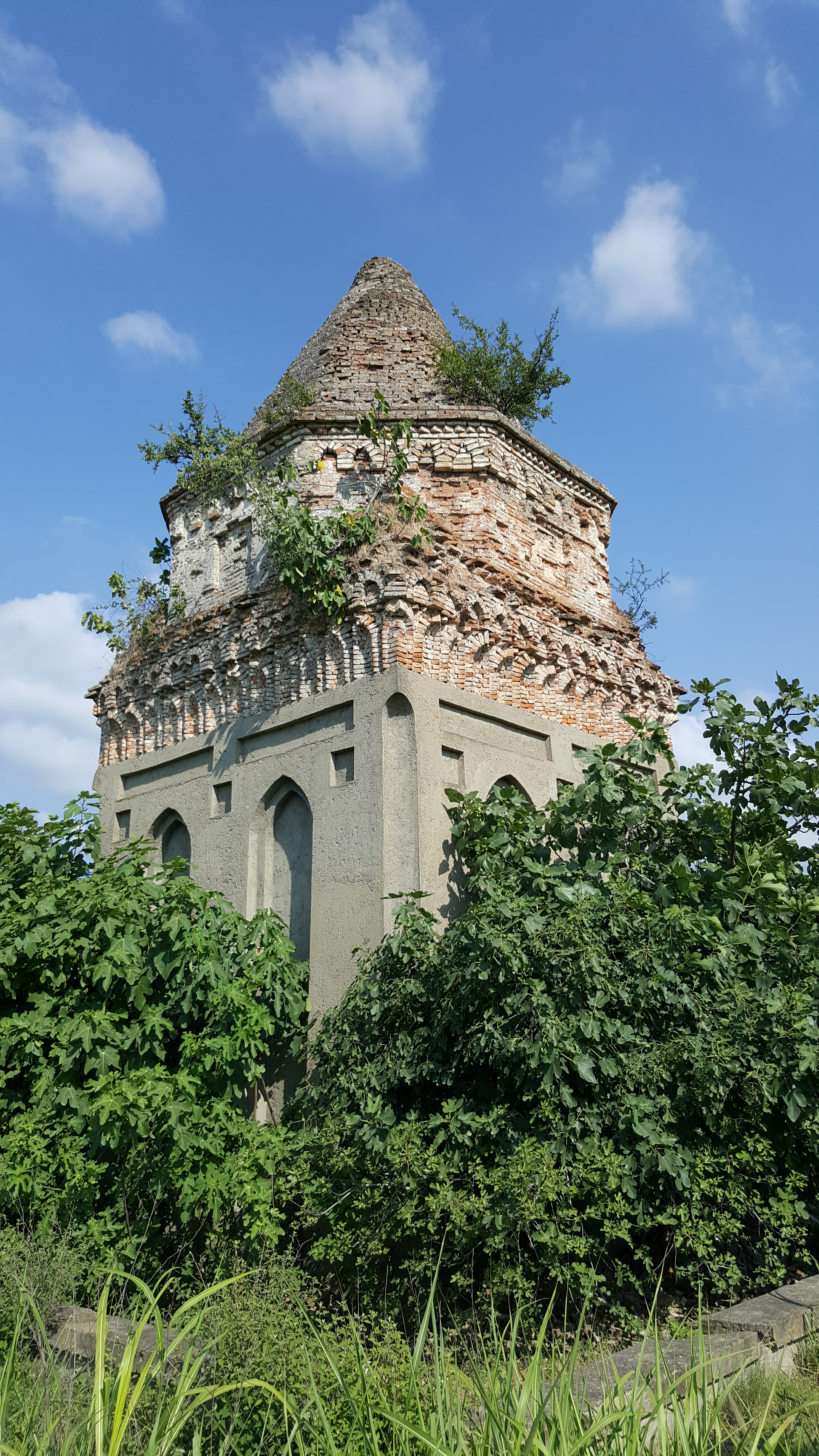 شاطر گنبد